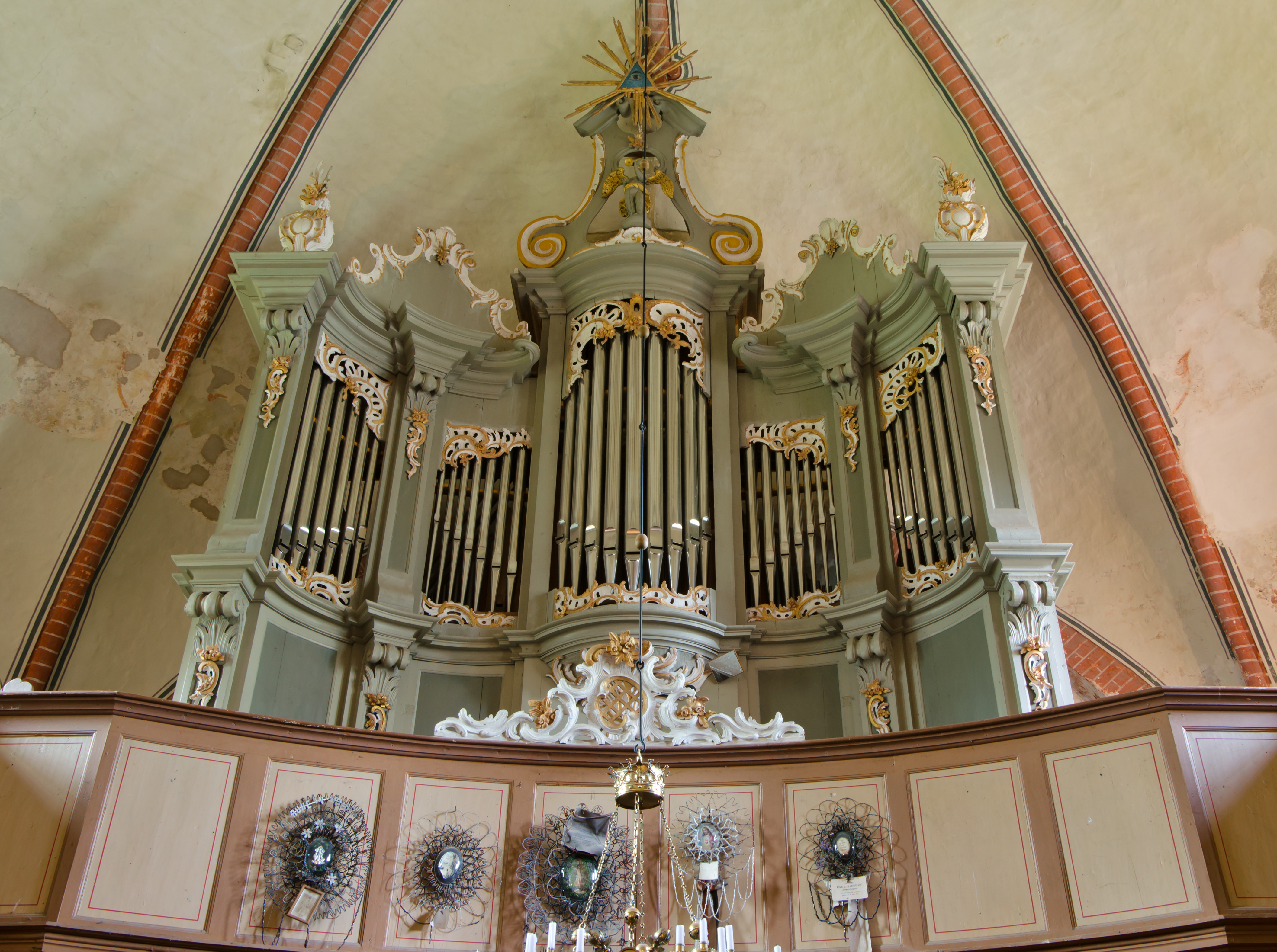 Neukirchen (Klein Belitz, Landkreis Rostock), Kirche, Orgel